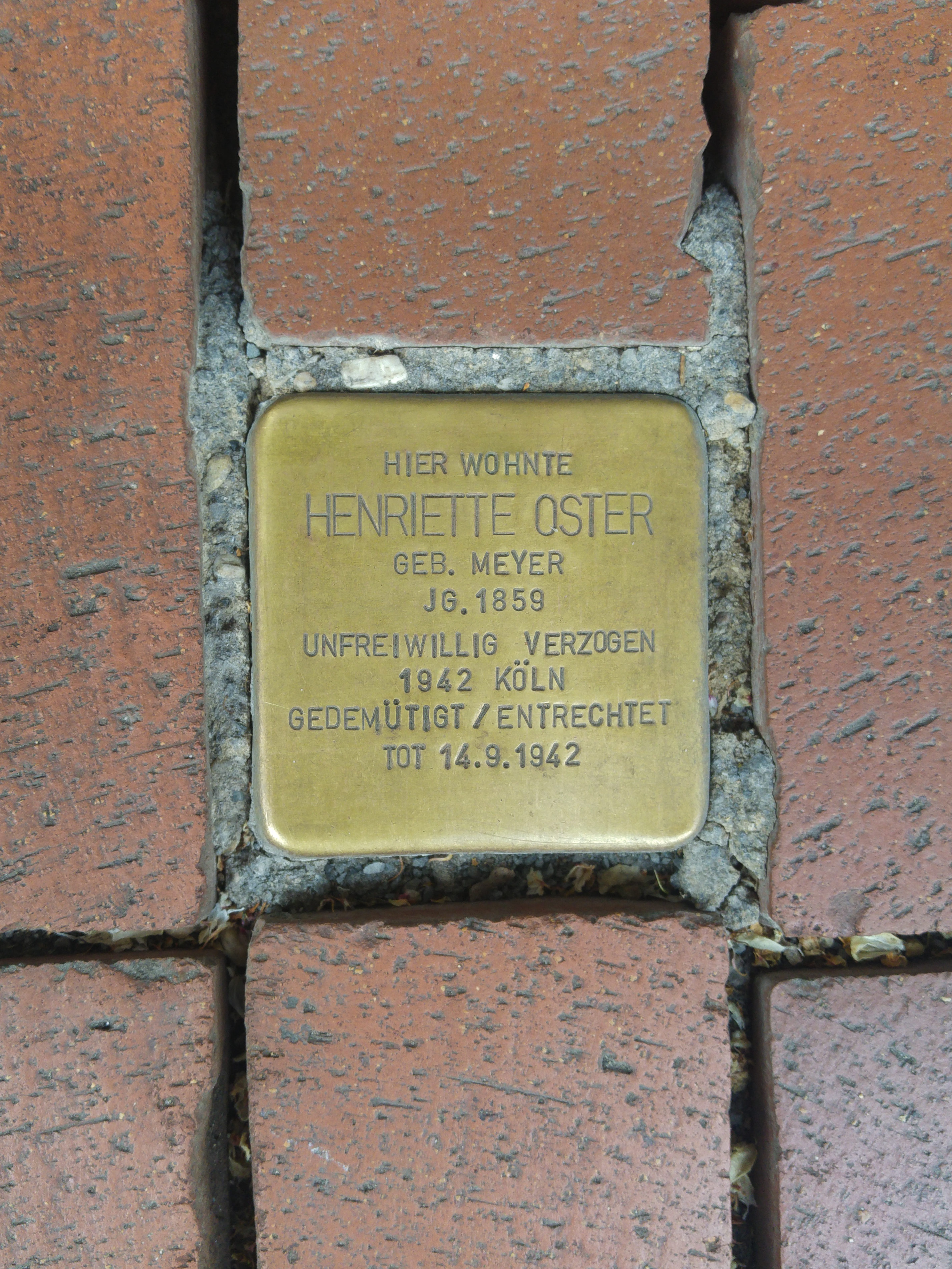 Stolperstein für Henriette Oster (verlegt 2019), Burgstraße 54, Bad Godesberg (Ortsteil Alt-Godesberg)